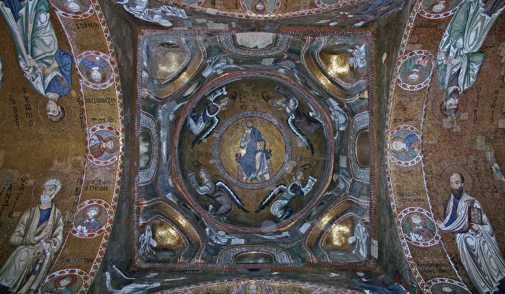 Palermo, Sicilia, ItaliaByzantine mosaic 2